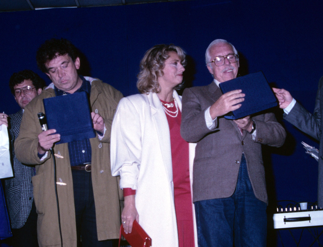 Luciano Salce 1986